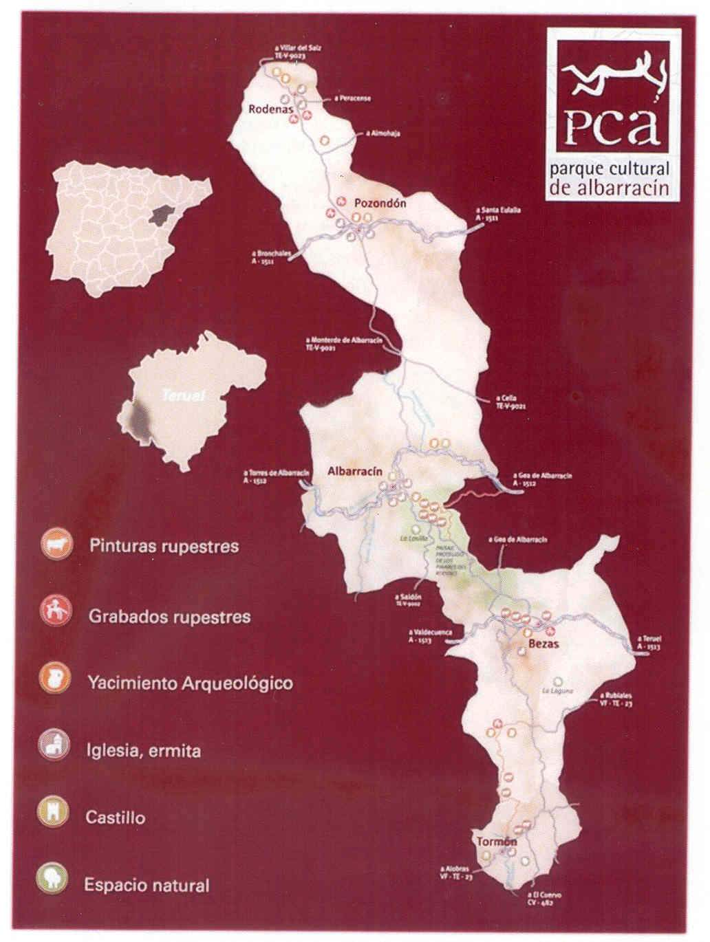 Mapa del Parque Cultural de Albarracín, con detalle de los municipios que lo forman (2018)